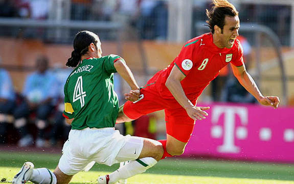 مصاف علی کریمی و مارکز - ایران ۱ - مکزیک ۳ - جام جهانی ۲۰۰۶